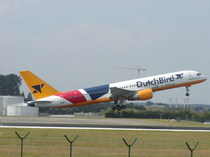 Boeing 757 PH-DBB van Dutchbird, Zaventem, 2003.